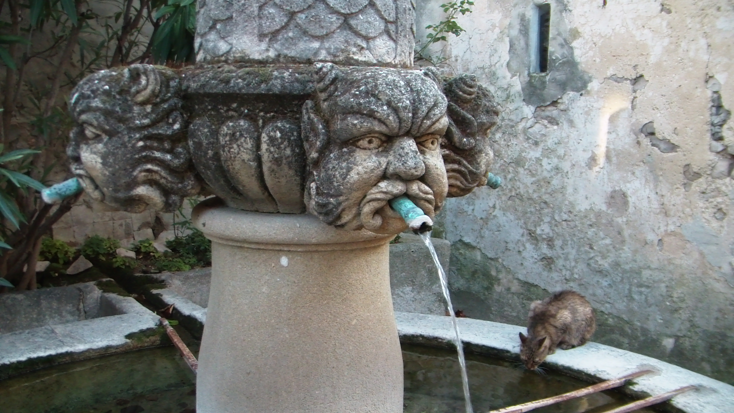 la fontaine des Mascarons classée monument historique